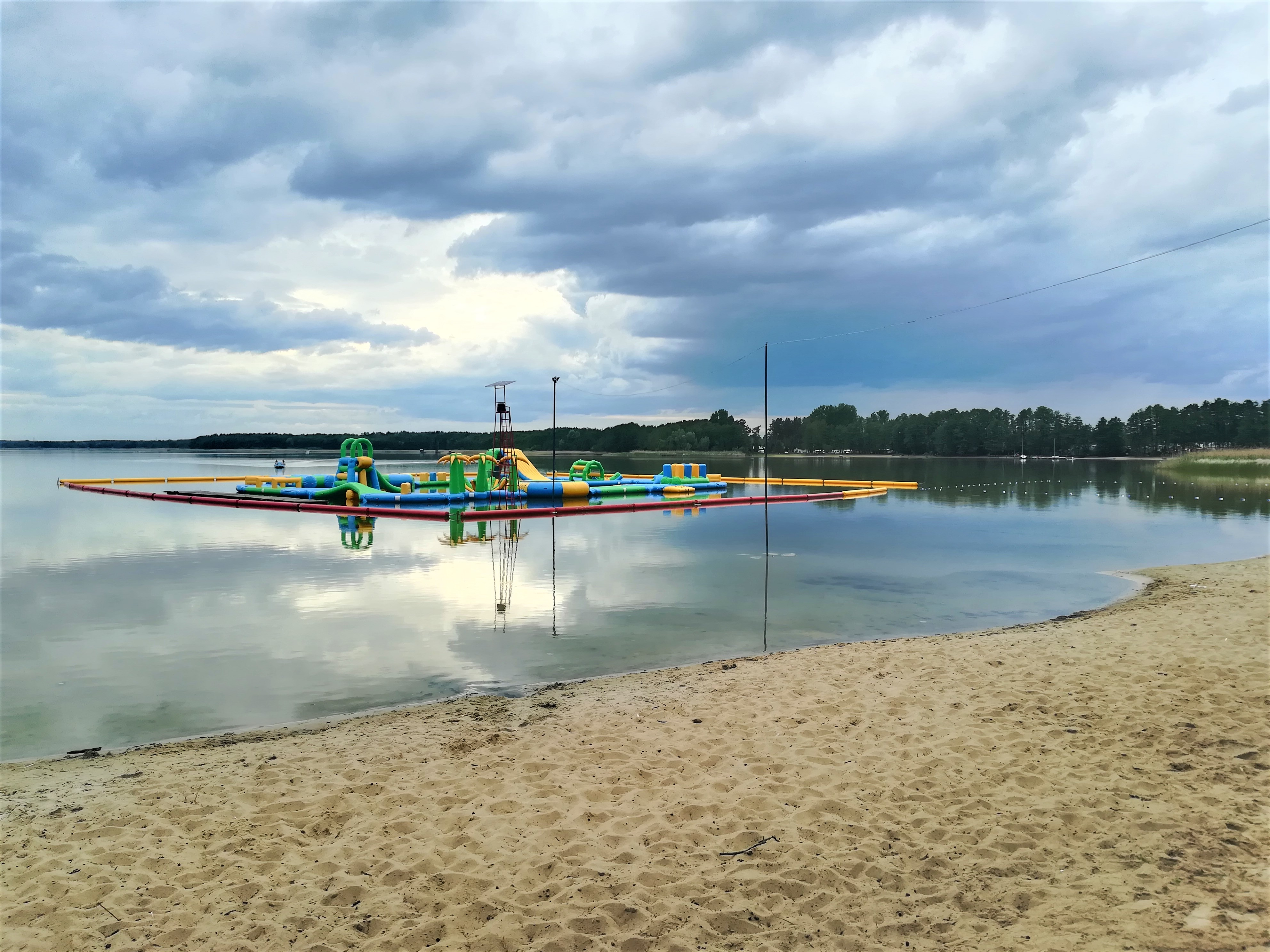 Jezioro Zdworskie z Koszelówki.